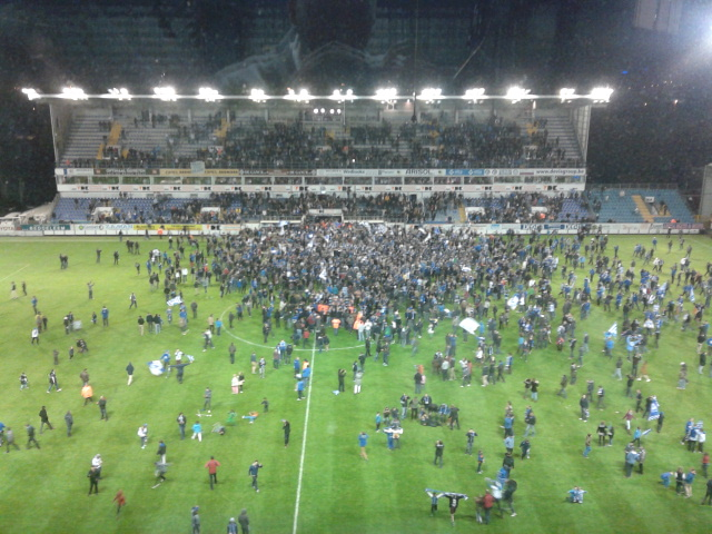 Een beeld van de KAA Gent-supporters, die het veld bestormen na de laatste wedstrijd in het Ottenstadion.